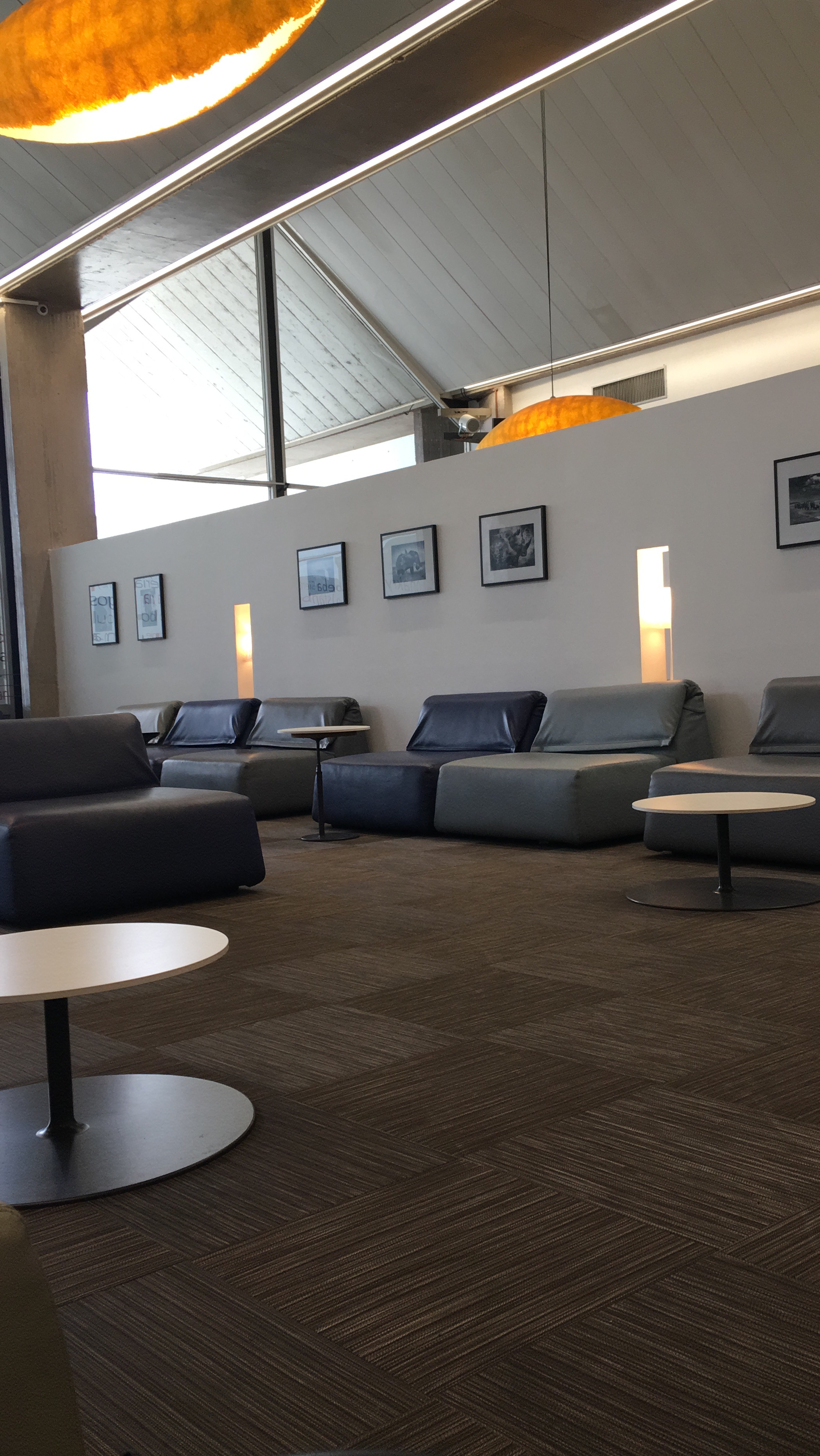 Vue du salon business de l'Aéroport d'Abidjan